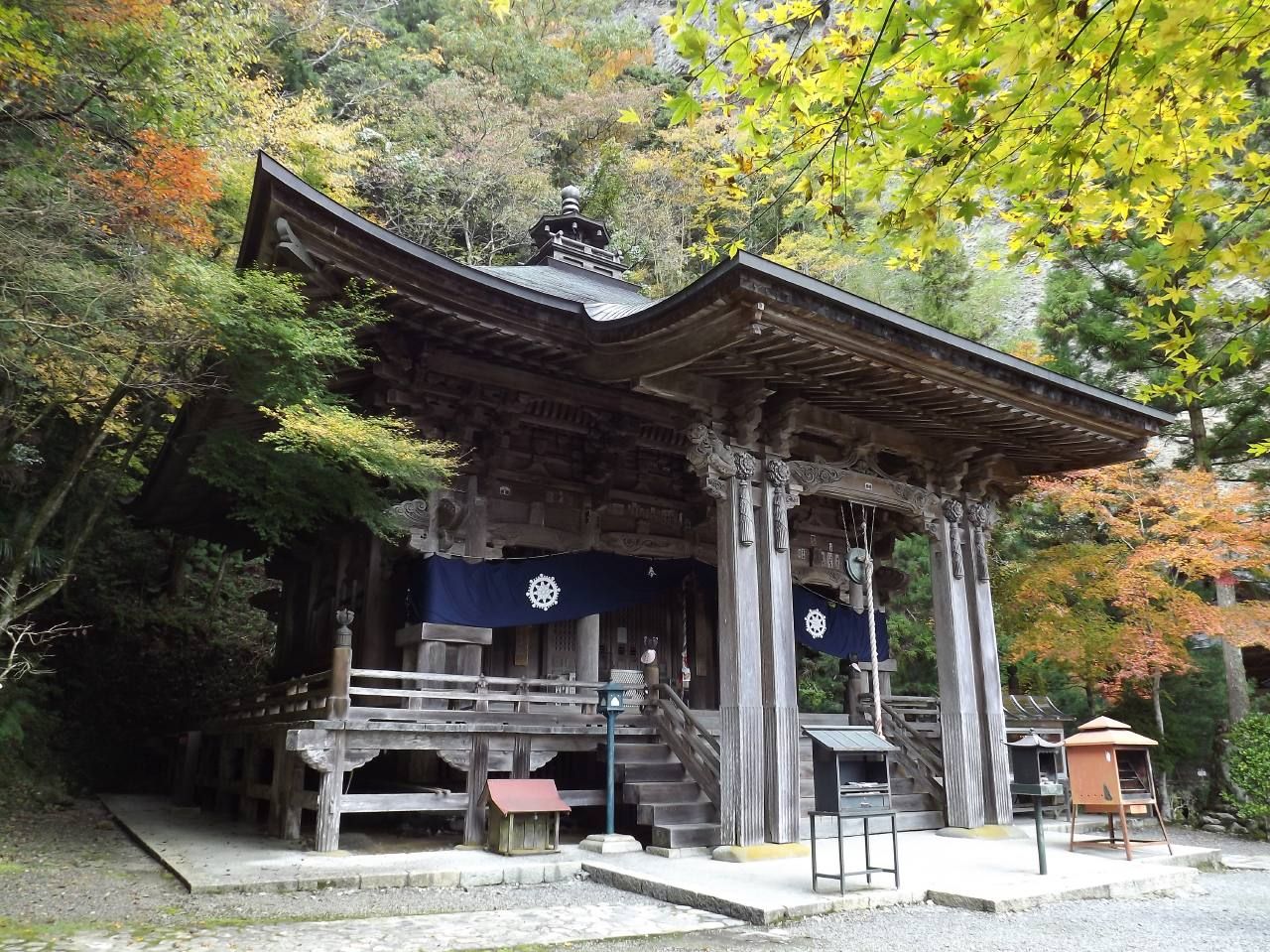 岩屋寺の大師堂